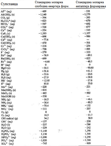 Таблица функција формирања